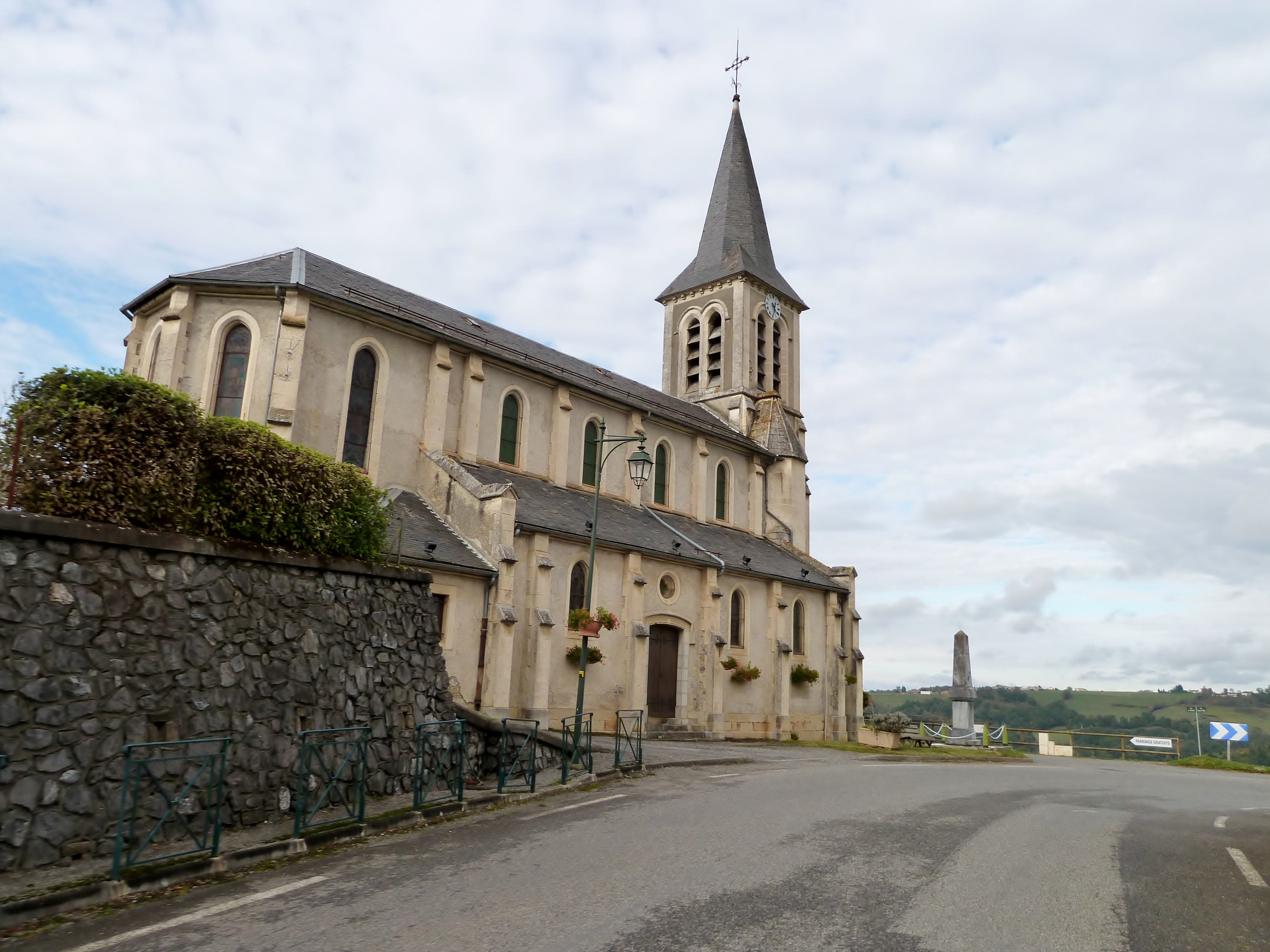 Église de Mauvezin (Hautes-Pyrénées)